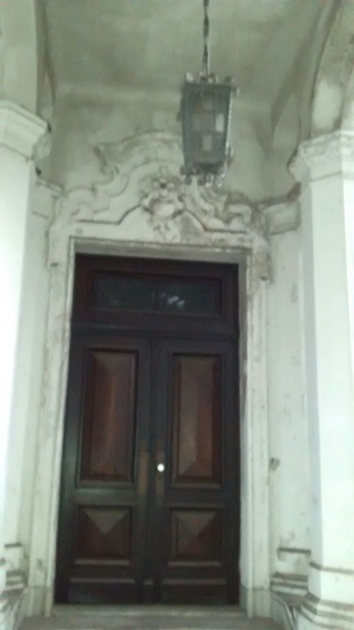 Fachada da casa da rua Cardoso de Almeida